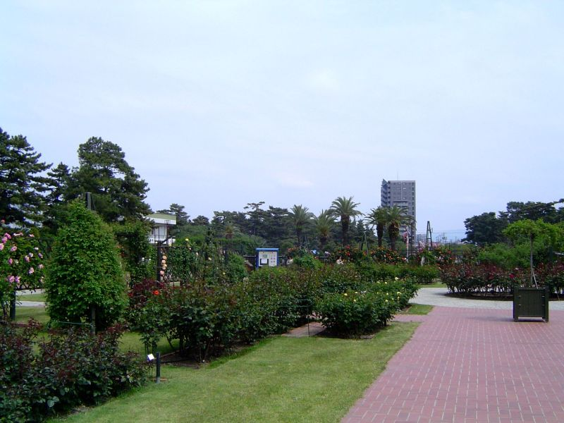 浜寺公園、撮影日:2009年5月3日。